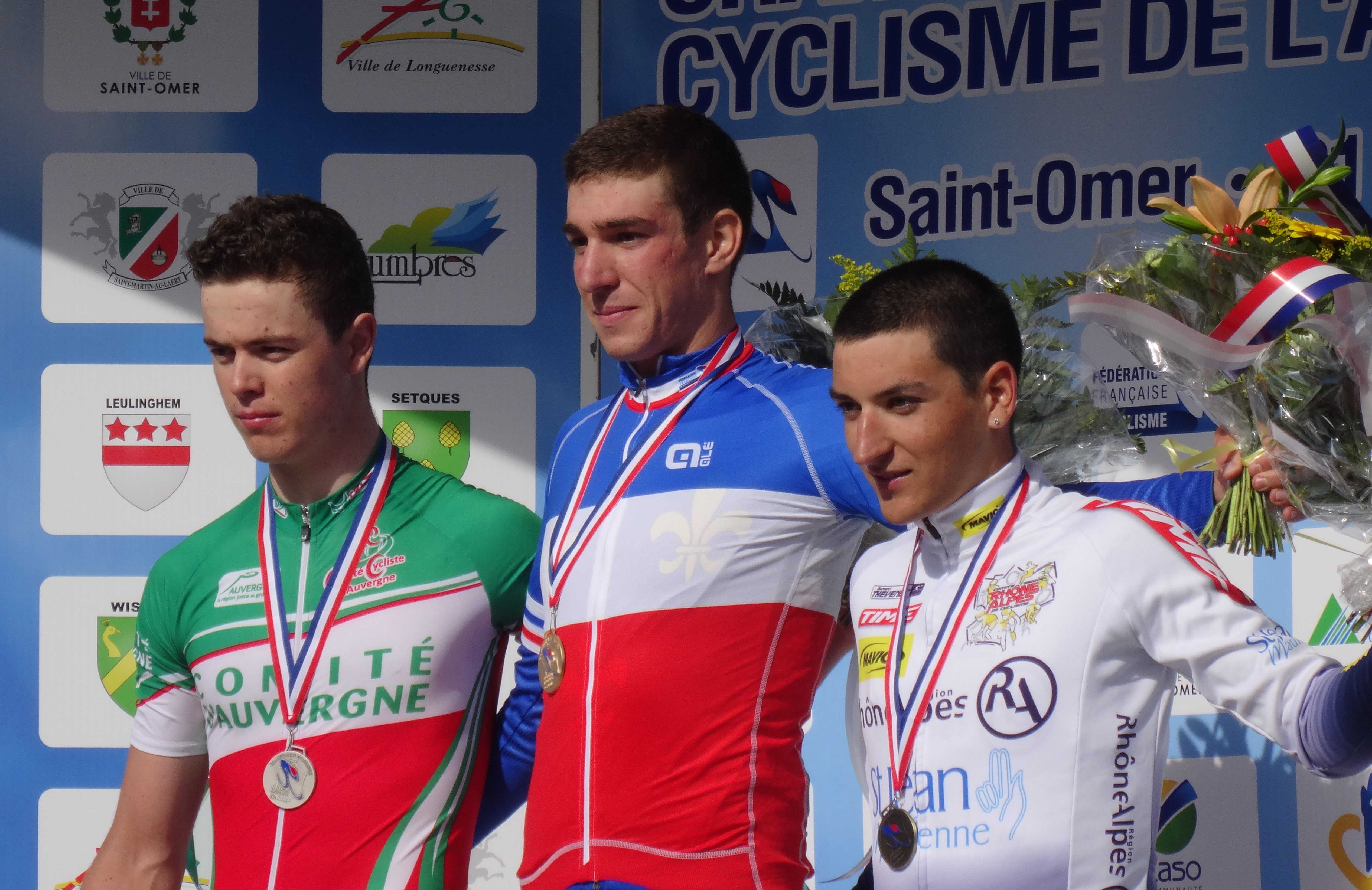 Reportage photographique réalisé le jeudi 21 août à l'occasion des Championnats de France de cyclisme sur route 2014 à Saint-Omer, Pas-de-Calais, Nord-Pas-de-Calais, France. La série A concerne le championnat de France du contre-la-montre juniors hommes, la série B le championnat de France du contre-la-montre espoirs hommes, la série C la remise des prix aux juniors hommes et la série D la remise des prix aux espoirs hommes. Depicted people: Rémi Cavagna, Bruno Armirail and Nans Peters